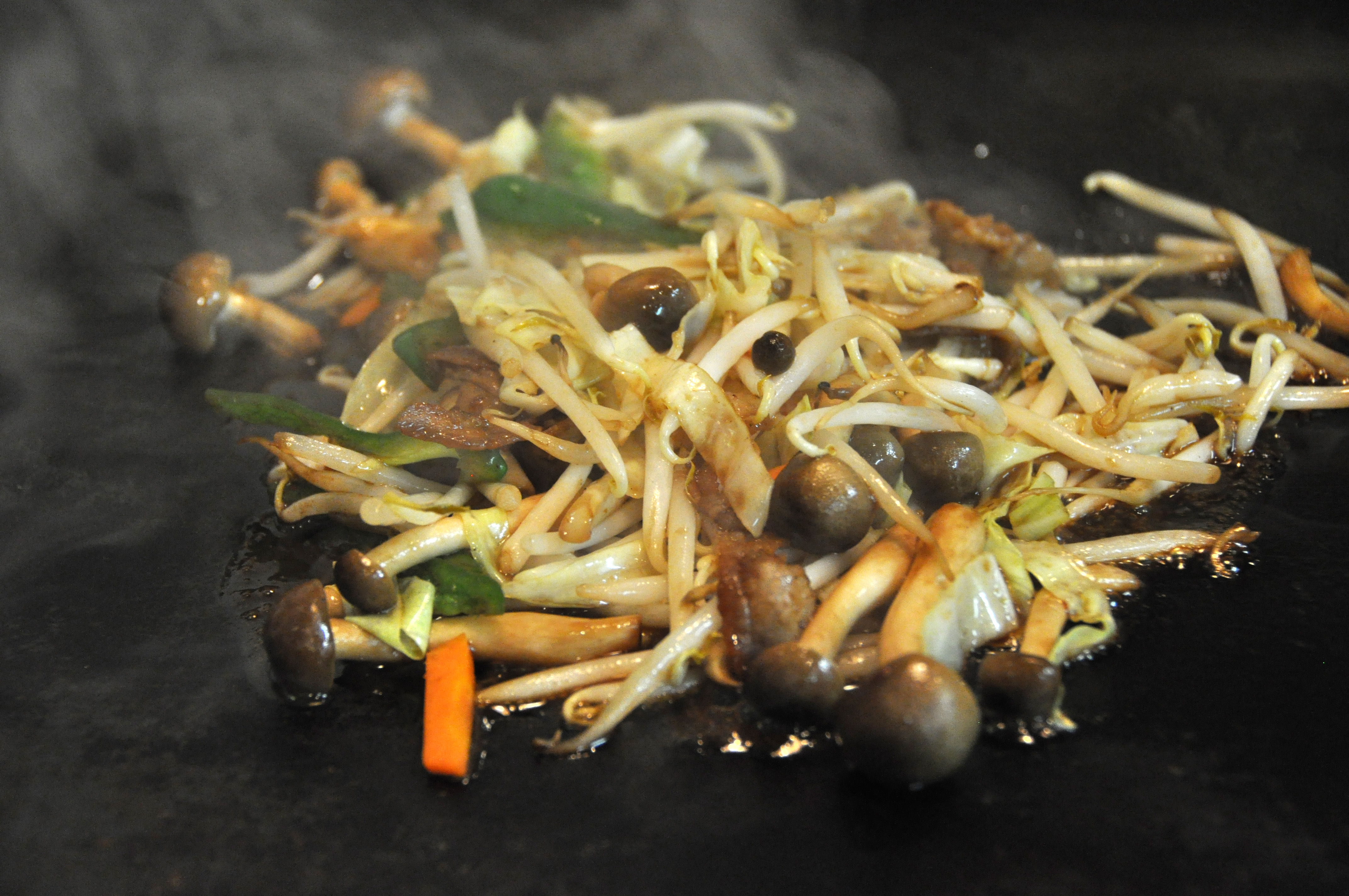 Stegte grøntsager (fried vegetables)